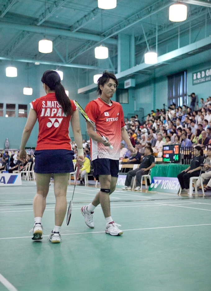 Shizuka Matsuo and Shoji Sato